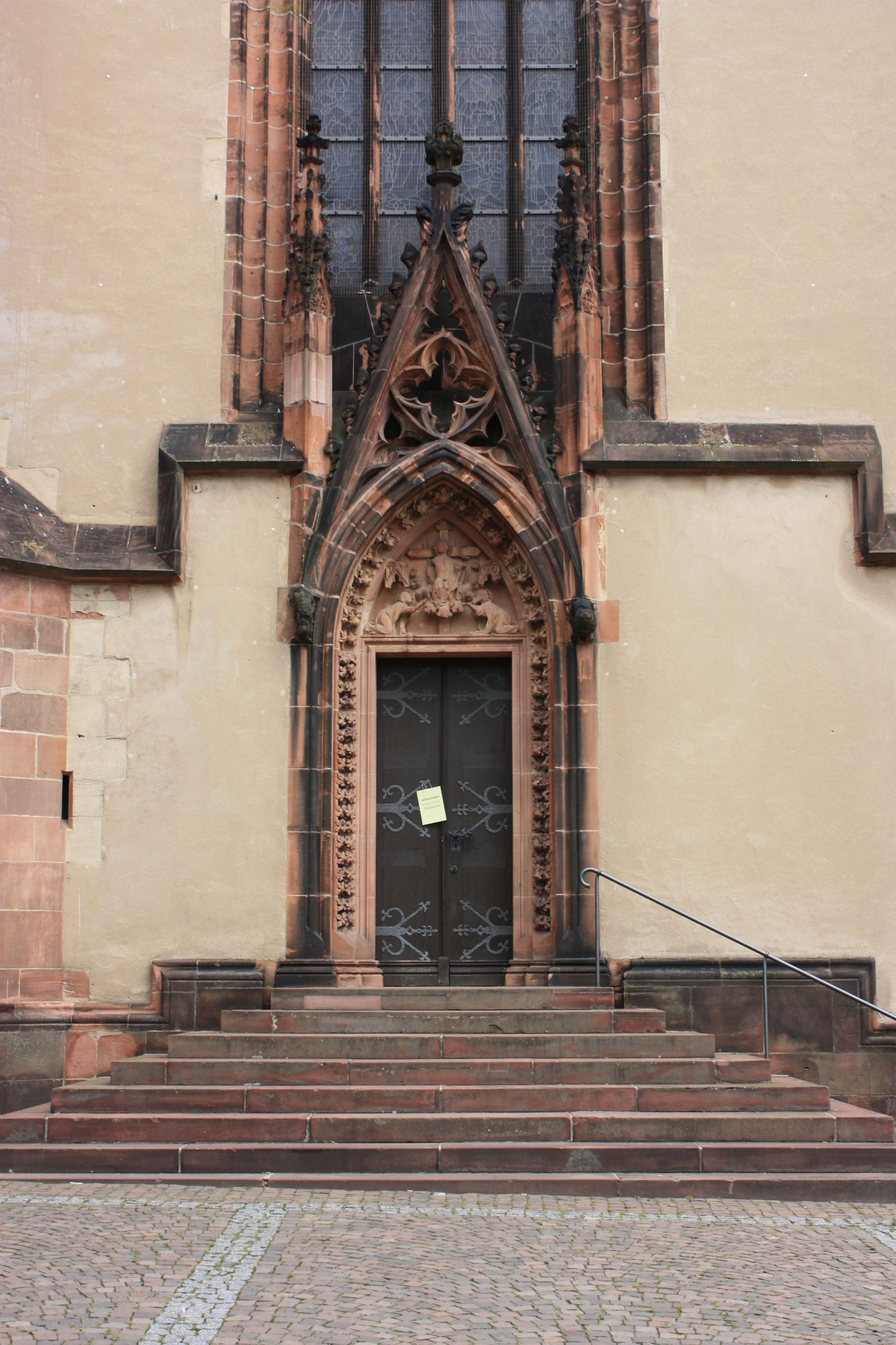 Seitentür im Chorbereich der Stadtkirche in Friedberg, Hessen, Deutschland